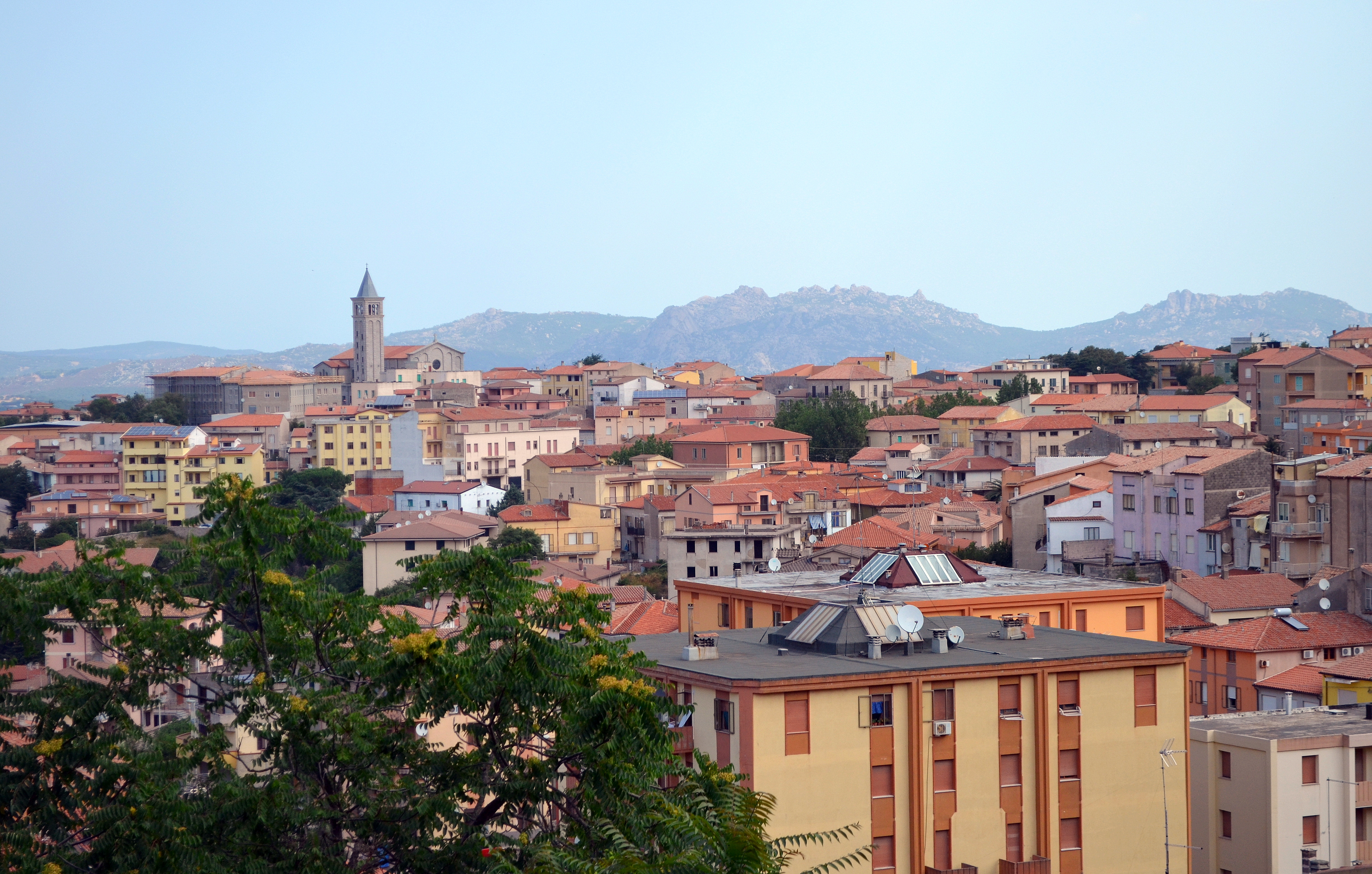 Gallura, 2016 (Sardaigne).